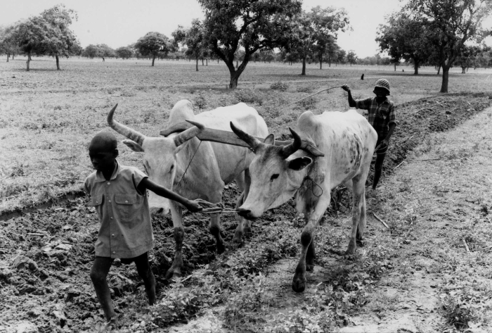 De jongen vooraan fungeert als gids en leidt de ossen door het juiste spoor.